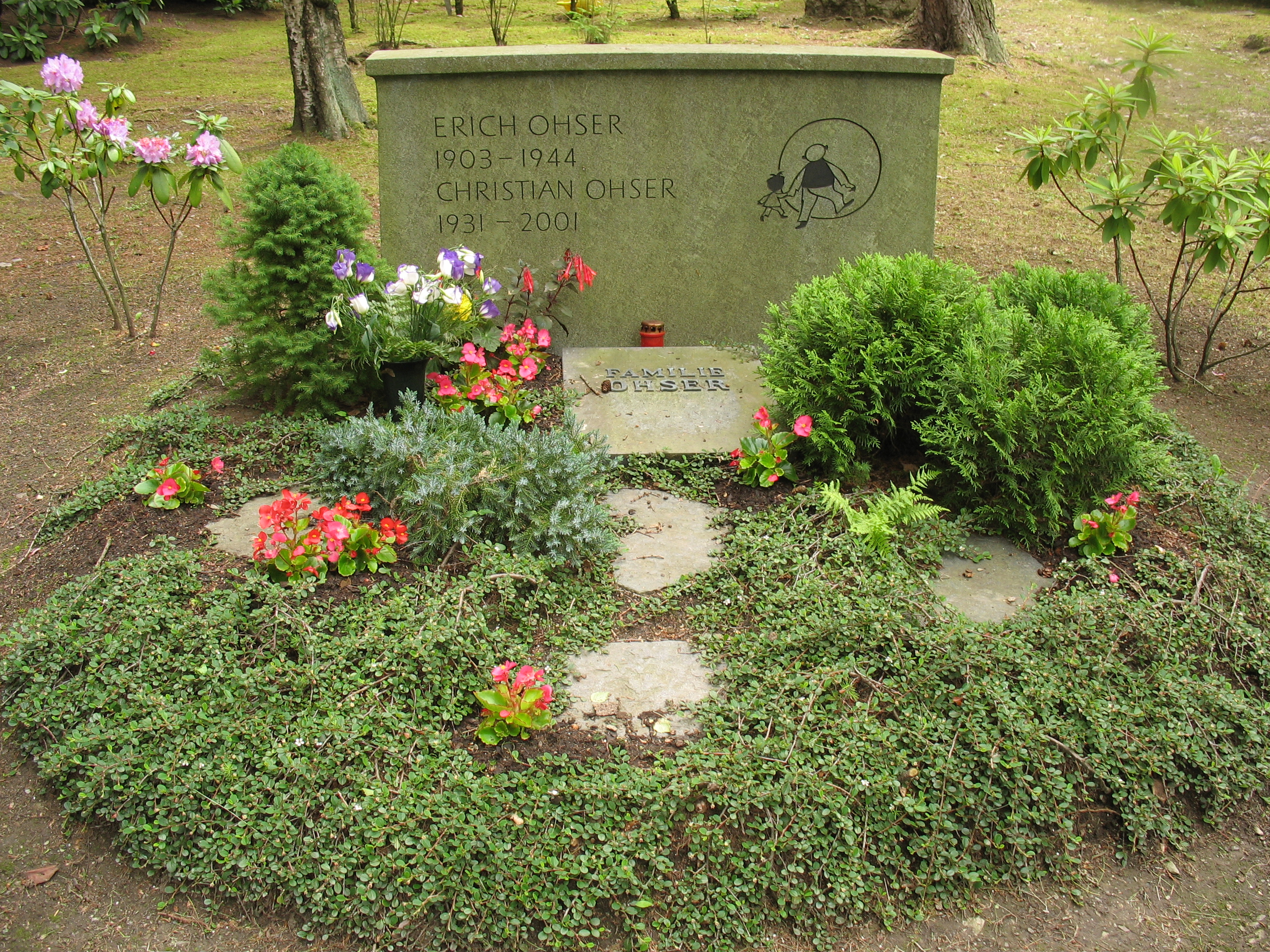 Plauen, Grab Erich Ohsers (e.o.plauen) und seines Sohnes Christian Ohser auf dem Hauptfriedhof